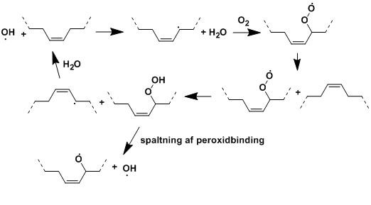 oxidativ hærdning af tørrende olie 1